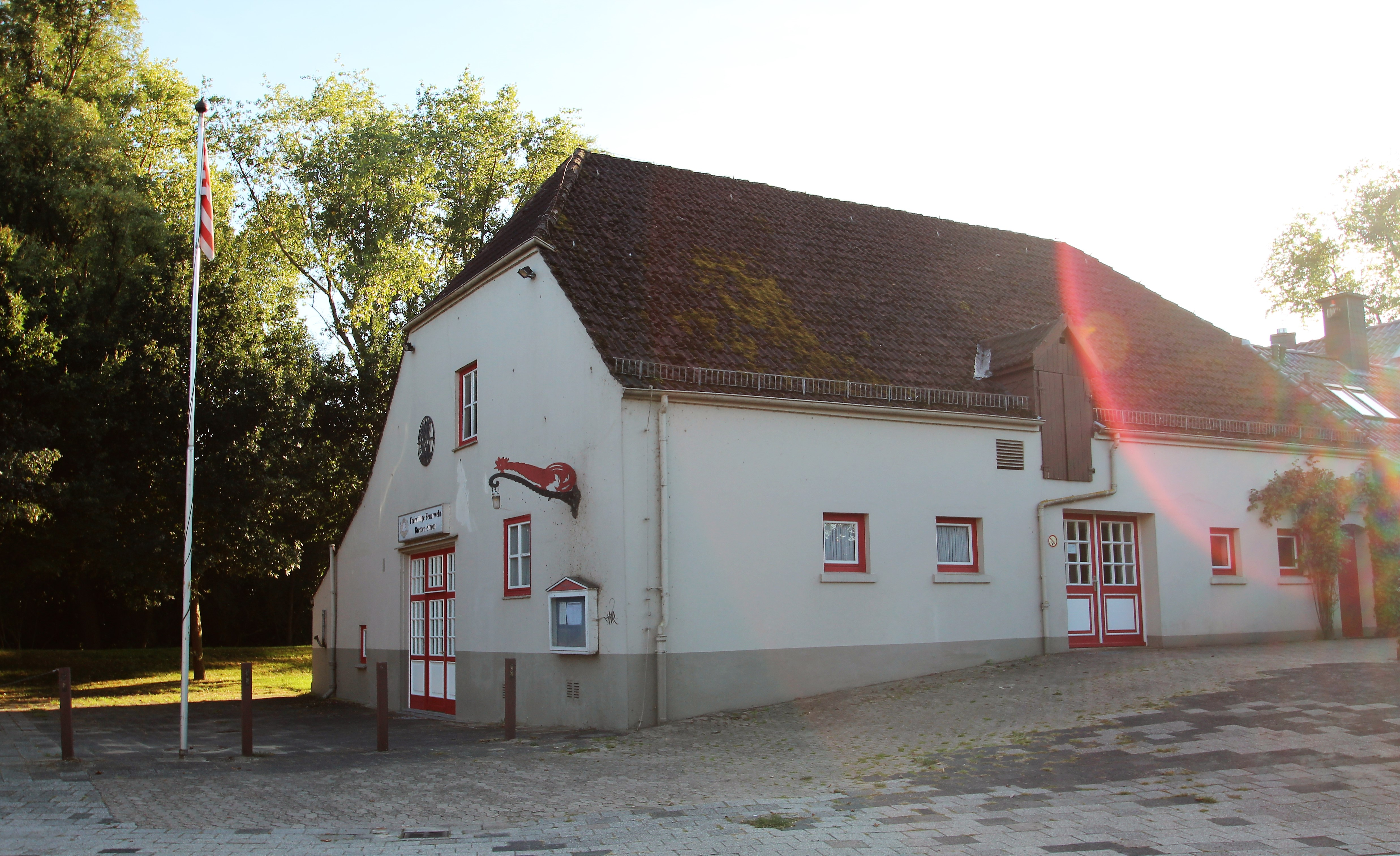 Das Gebäude der Freiwilligen Feuerwehr Bremen-Strom in Bremen-Strom, Stromer Landstraße 20.